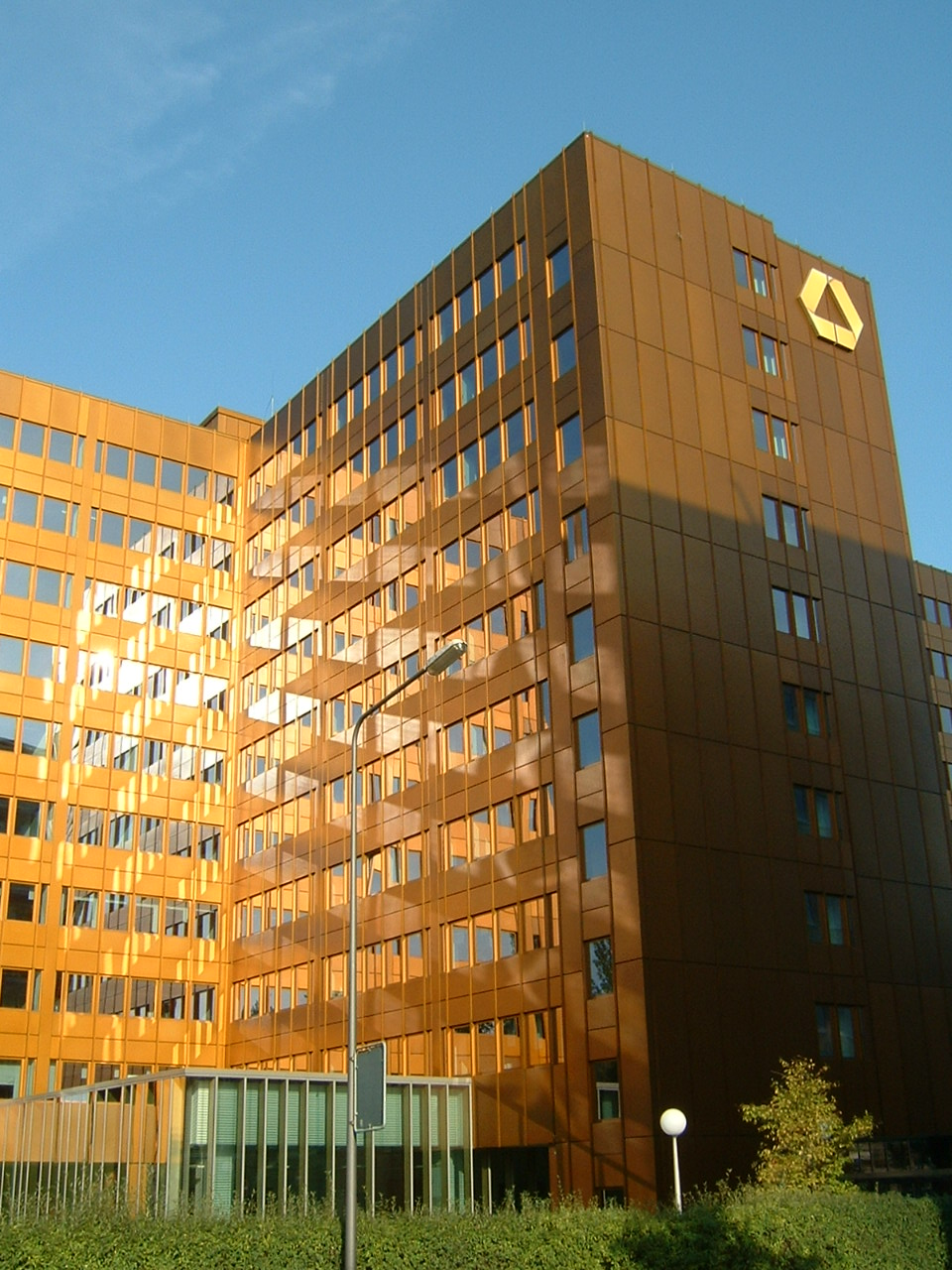 Commerzbank Systems, Gebäude auch Goldenes Haus genannt; Frankfurt Theodor Heuß Allee